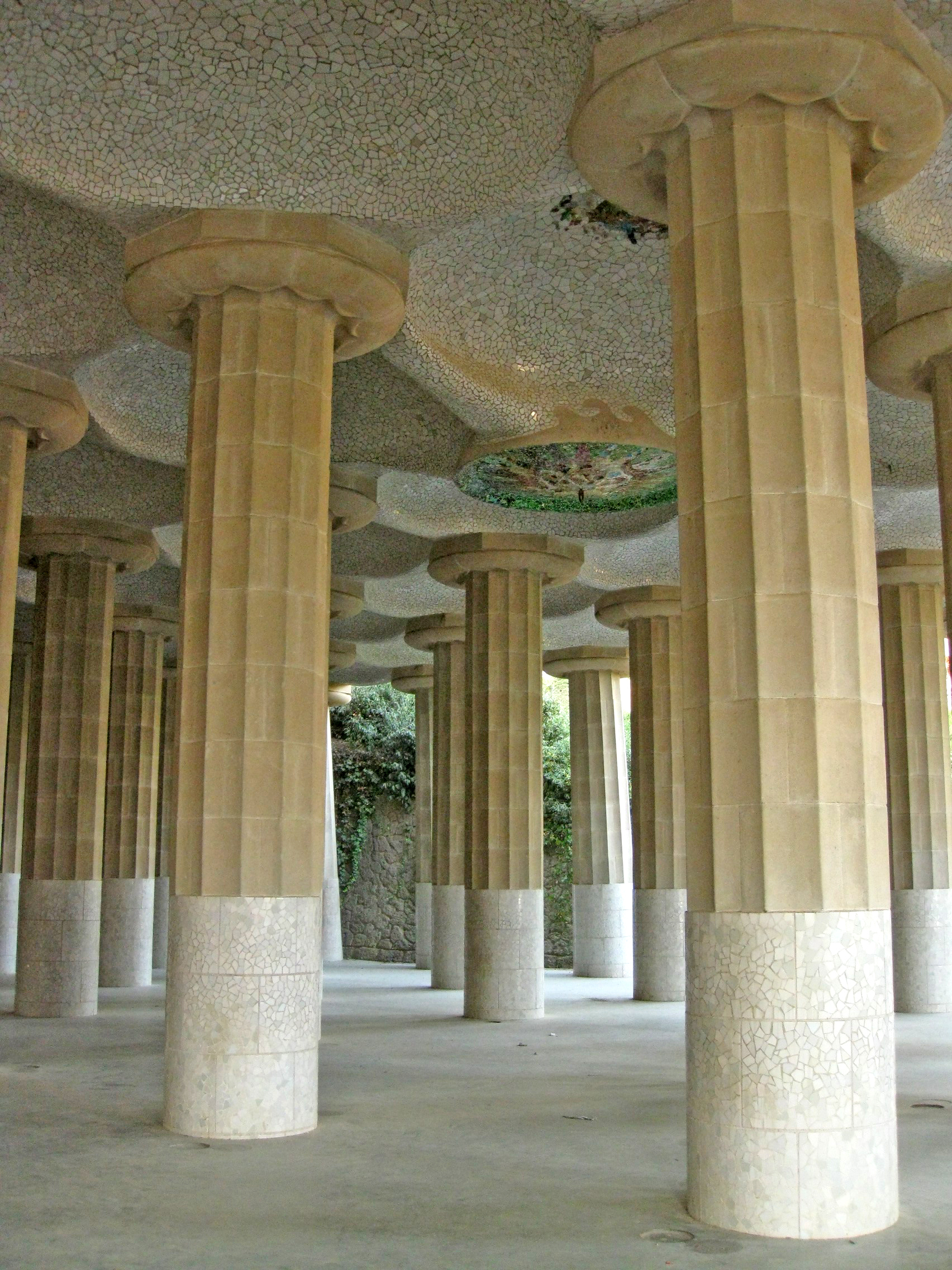 Columnata de la Sala Hipòstila del Parc Güell (Barcelona)